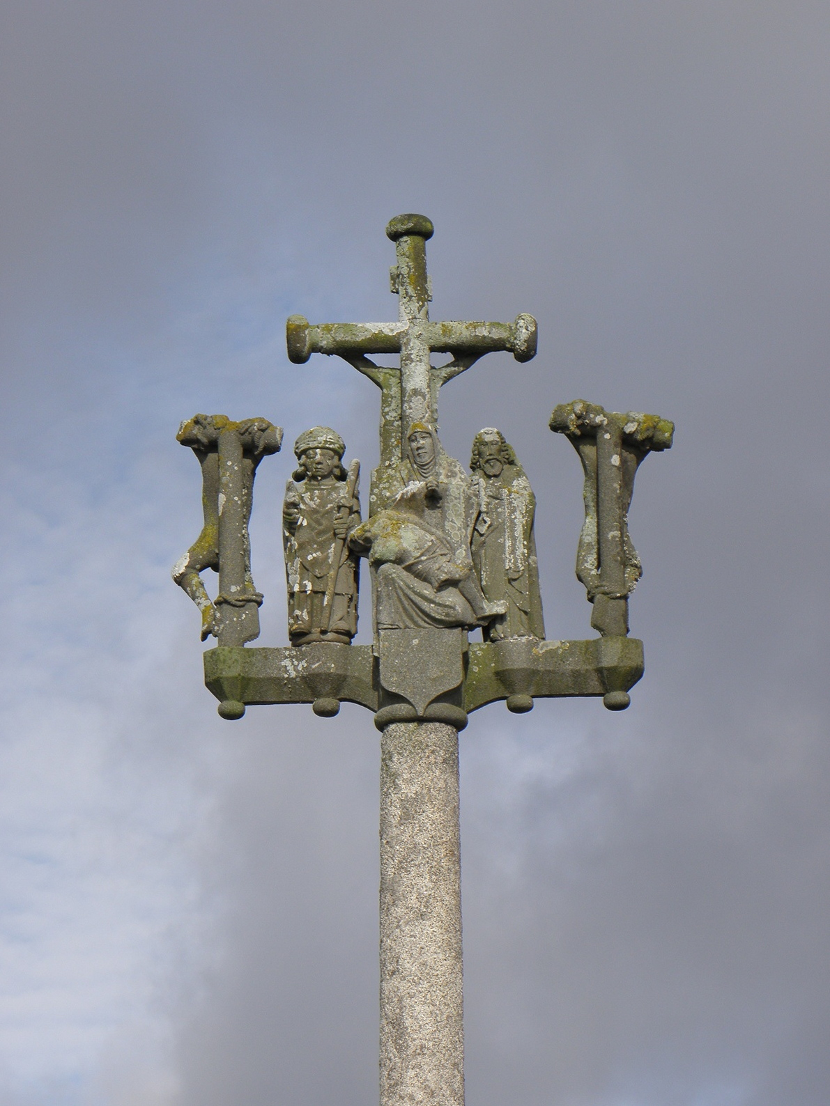 Calvaire de l'enclos paroissial de Trézilidé (29).